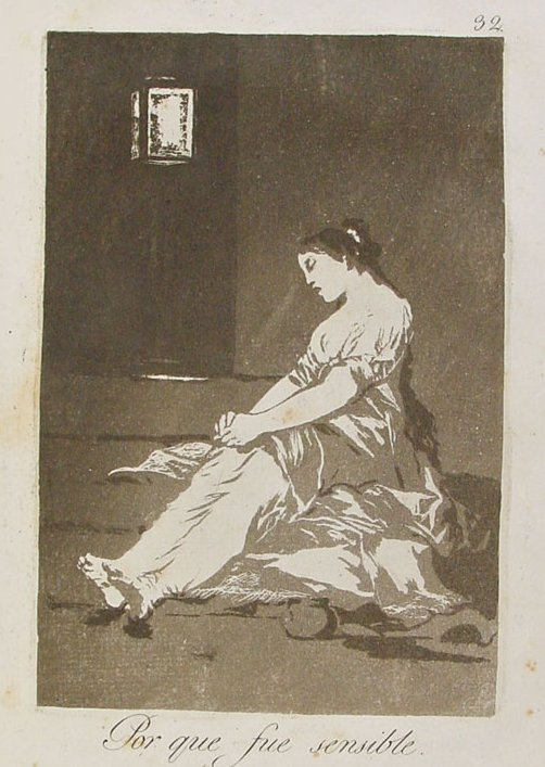 Capricho nº 32: Porque fue sensible de Goya, serie Los Caprichos